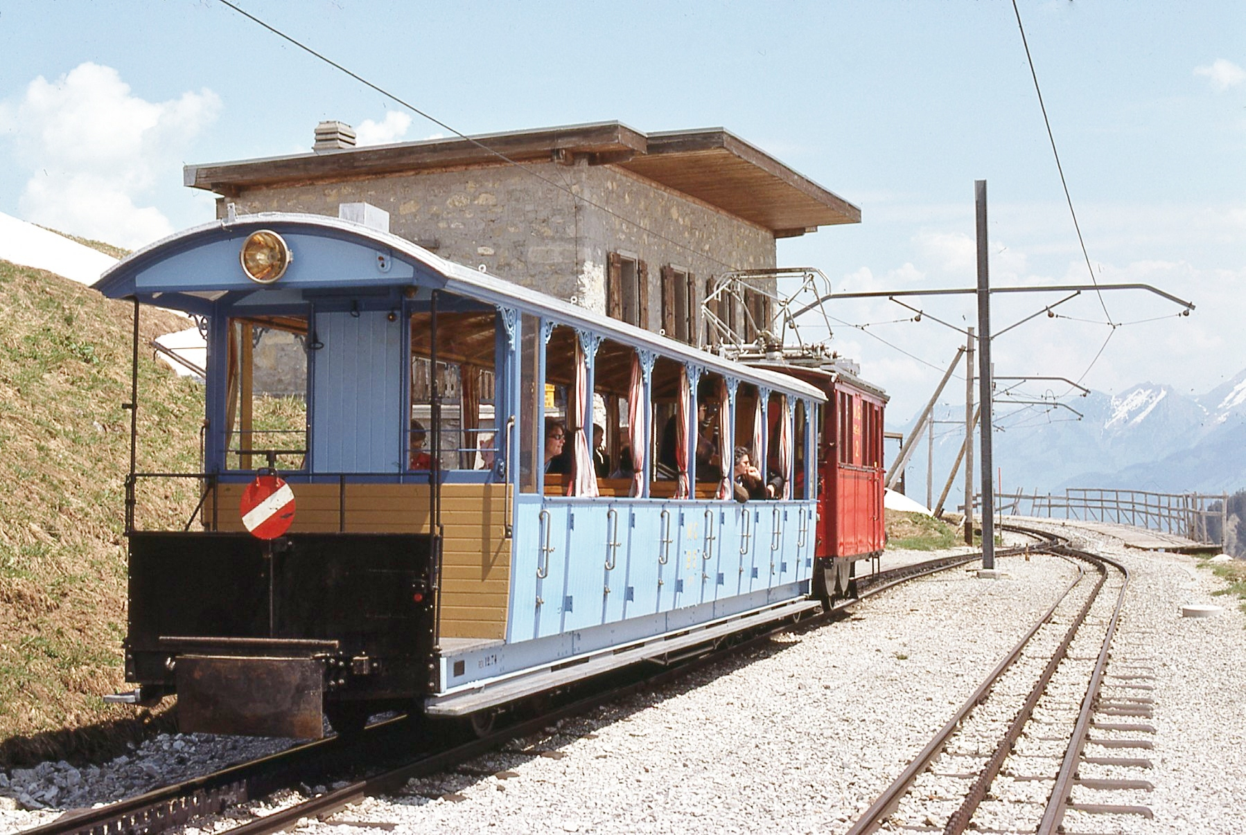 Photo. Trams aux Fils Prise en juin 1978 La ligne du Montreux Glion Naye à été construite entre1892 et 1909, à voie étroite (80cm) et à crémaillière, sa longueur et de 10,5 Kilomètres, sa déclivité est de 220%.